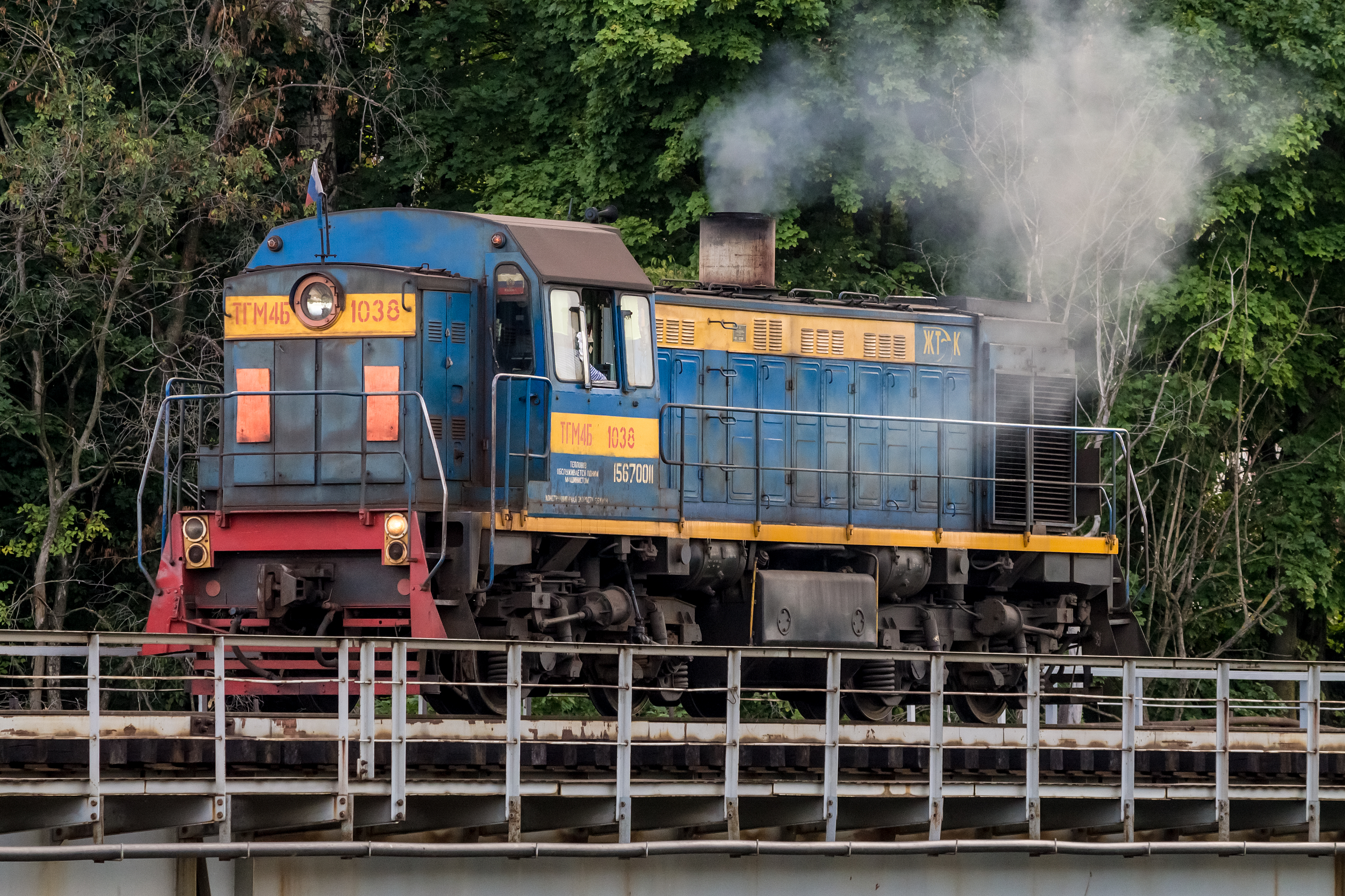 ТГМ4Б-1038, подъездные пути Ижорского завода см. фото 697218 в альбоме автора